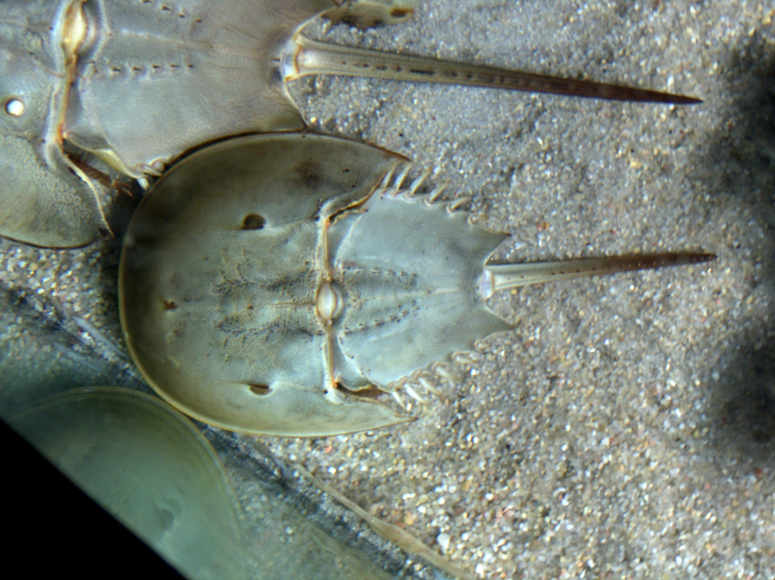 Peixe